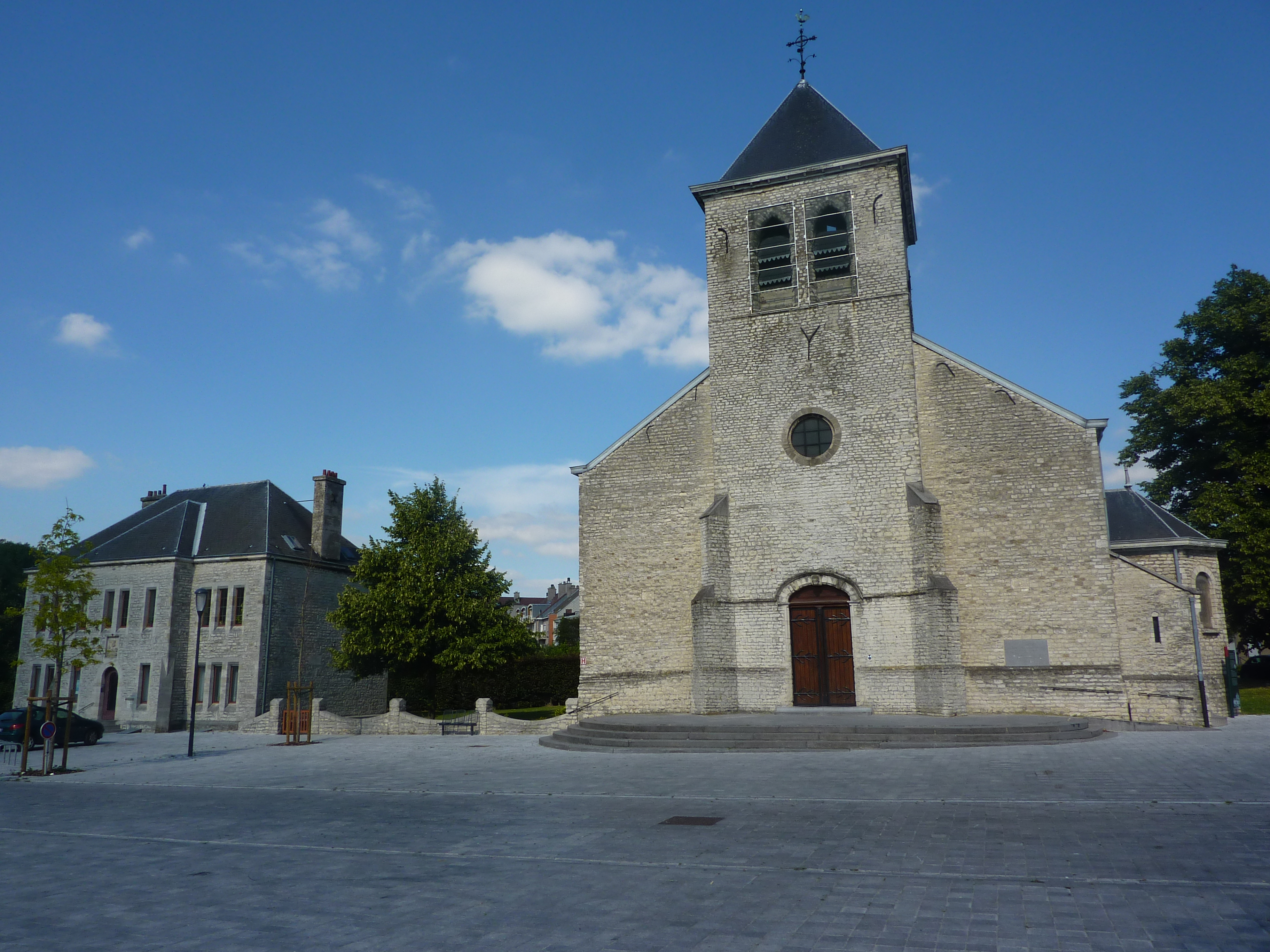 Église Saint-Vincent à Evere, Bruxelles, Belgique.